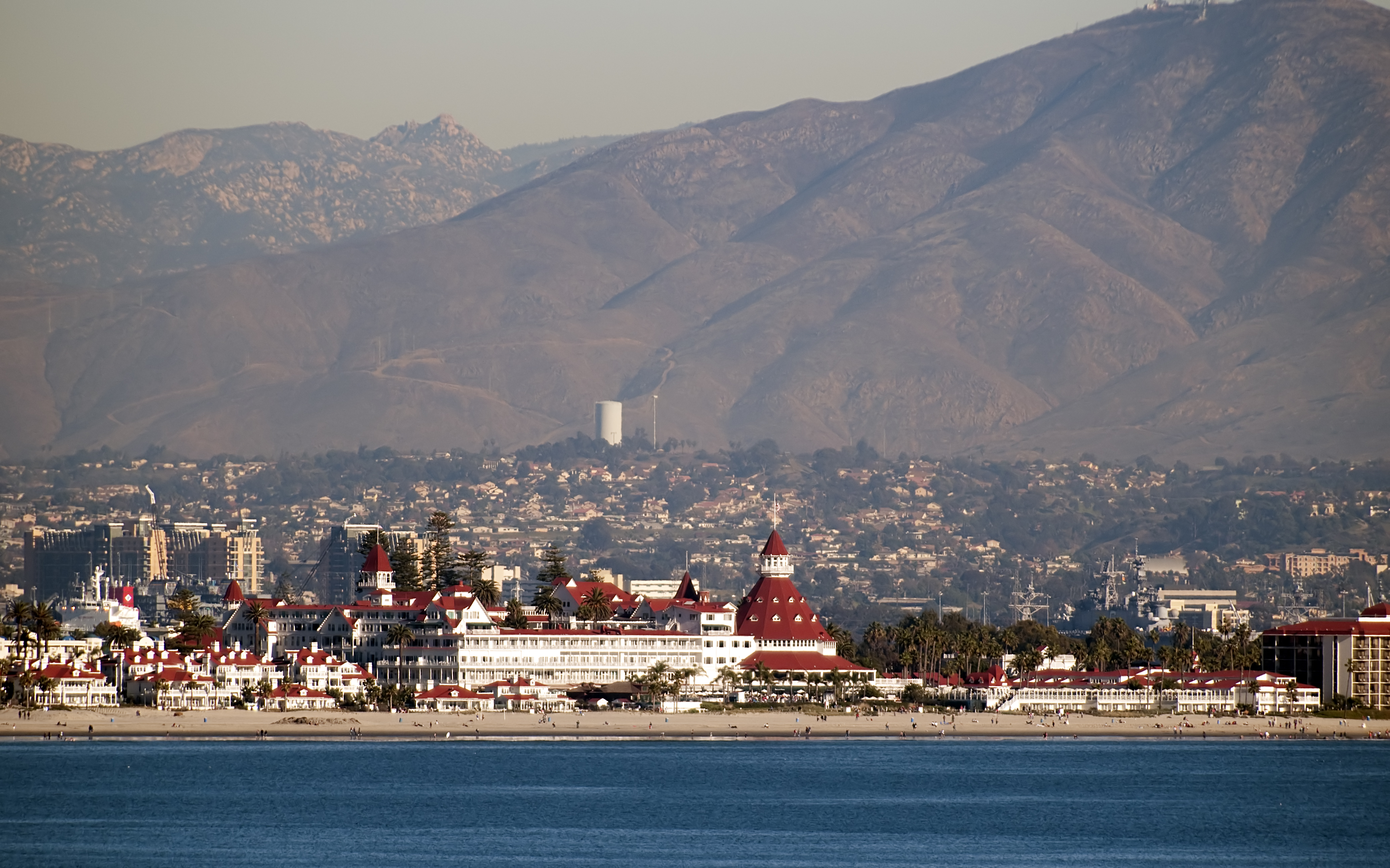 Hotel del Coronado in San Diego, California as seen from Cabrillo National Monument